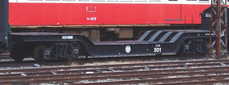 Oigawa Railway type Shiki 301. at Senzu Sta.